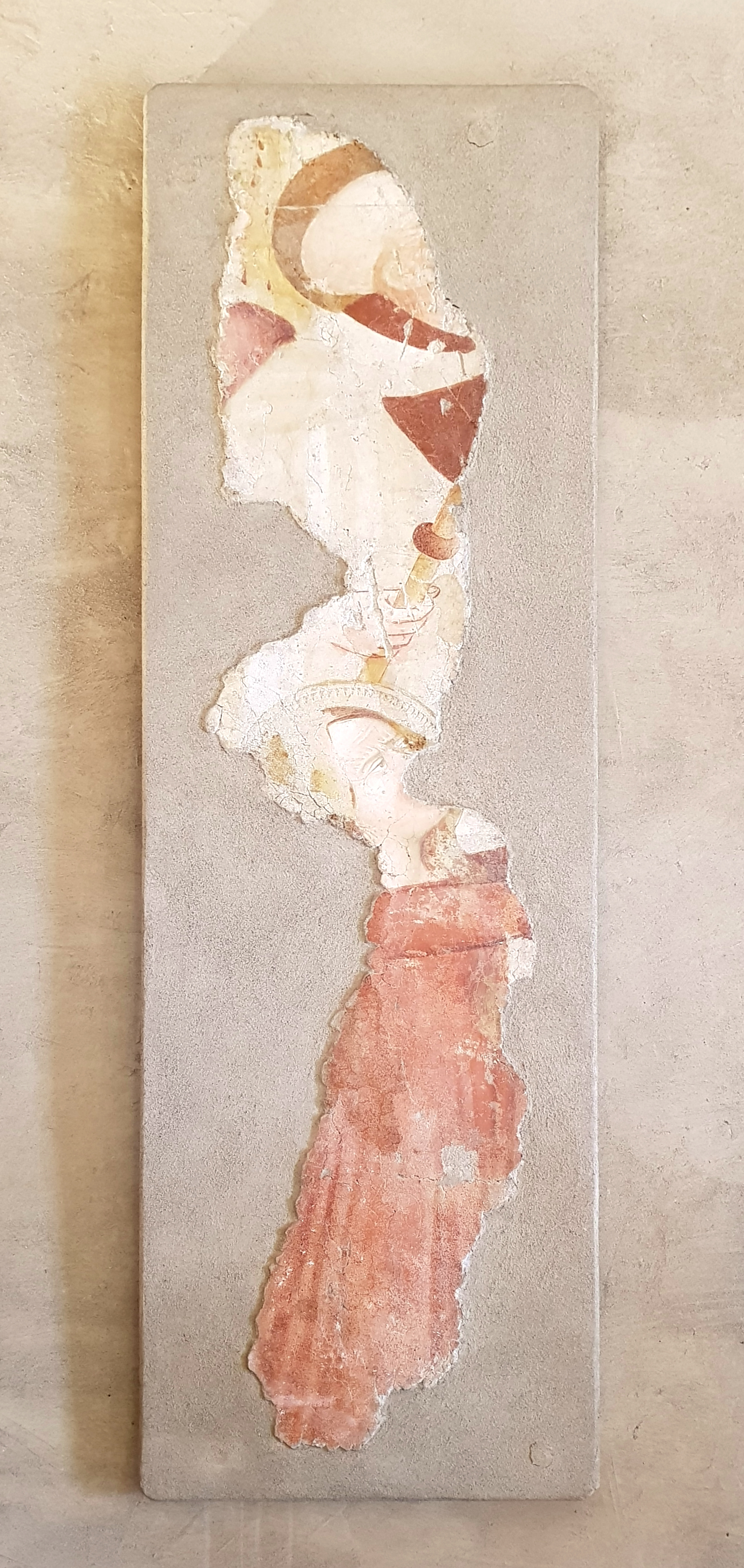 Chiesa di Ognissanti di Ospedaletto - Primo strato di affreschi: Maddalena ai piedi della Croce. lacerto inizio del sec. XV